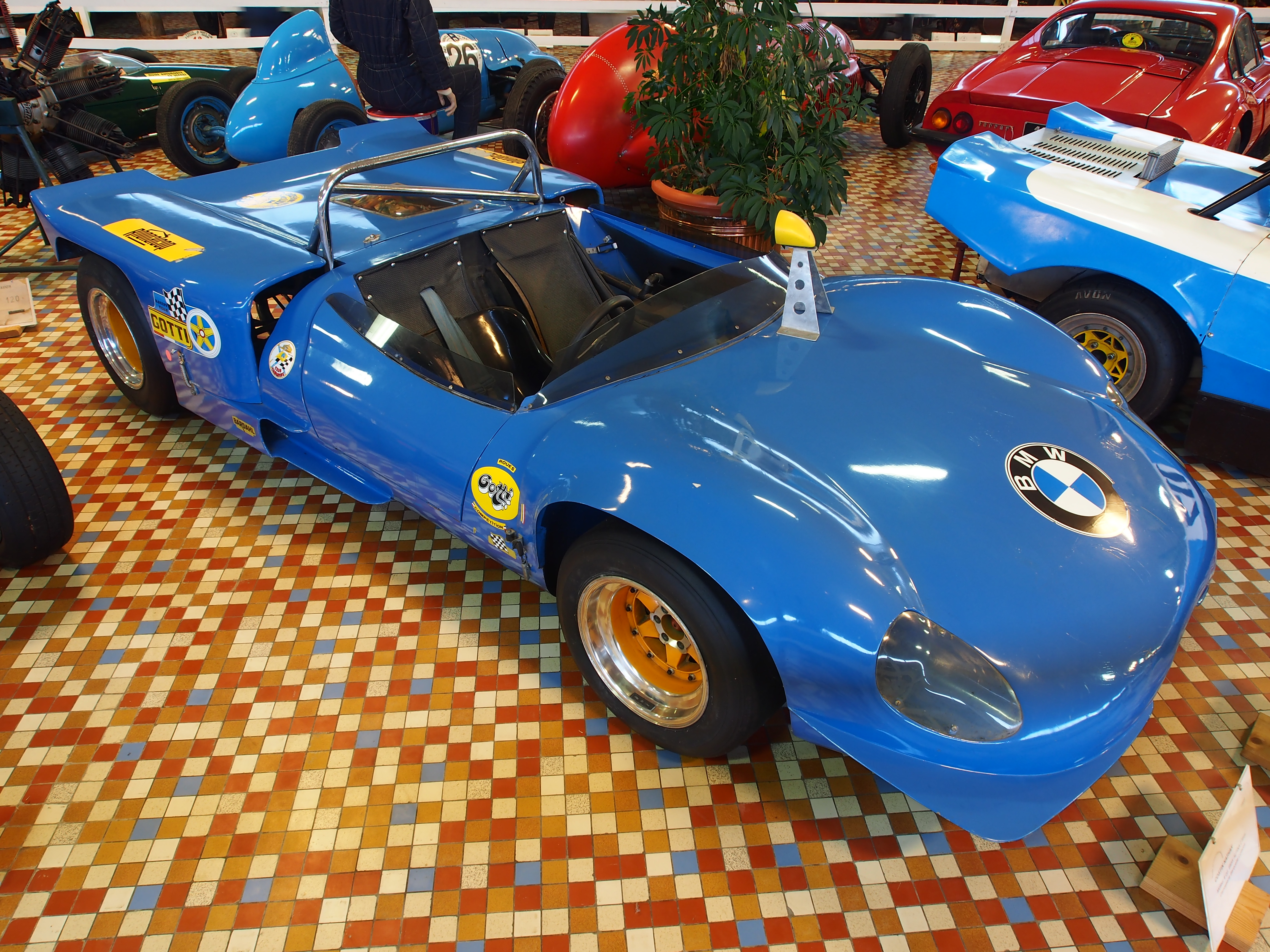 Photographed at the Musée Automobile de Vendée, France.